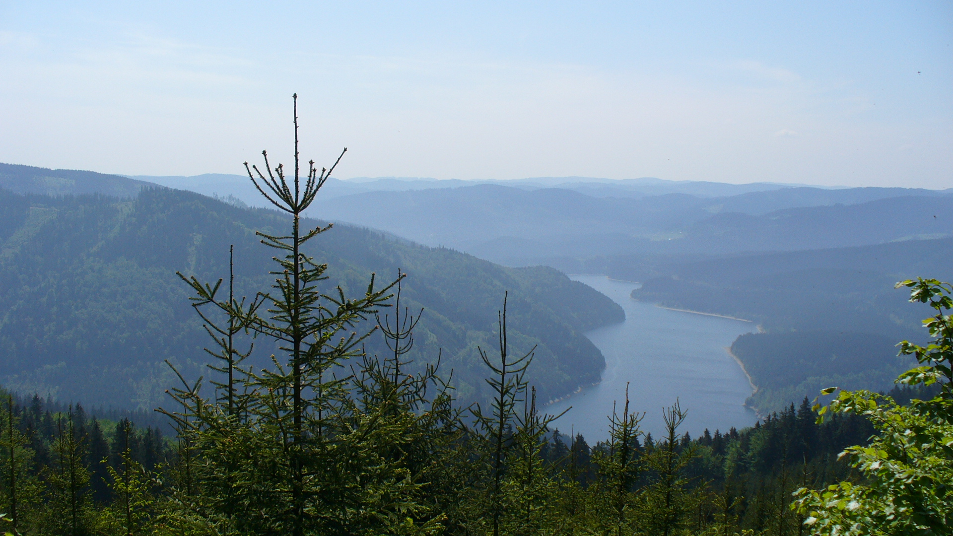 Vodní nádrž Šance